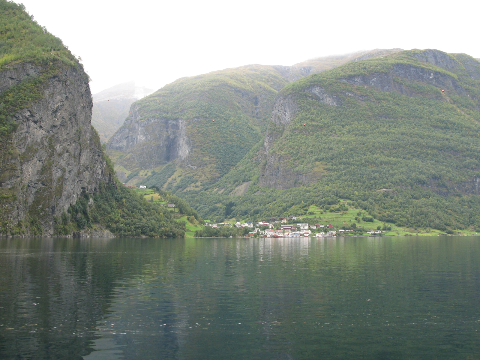 village Undredal by Aurlandsfjorden